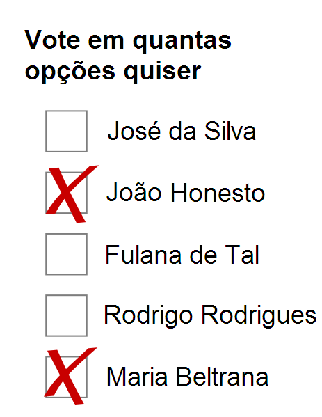 Exemplo de cÃ©dula para votaÃ§Ã£o por aprovaÃ§Ã£o. Adaptado de pt::en:Image:Approval ballot.svg